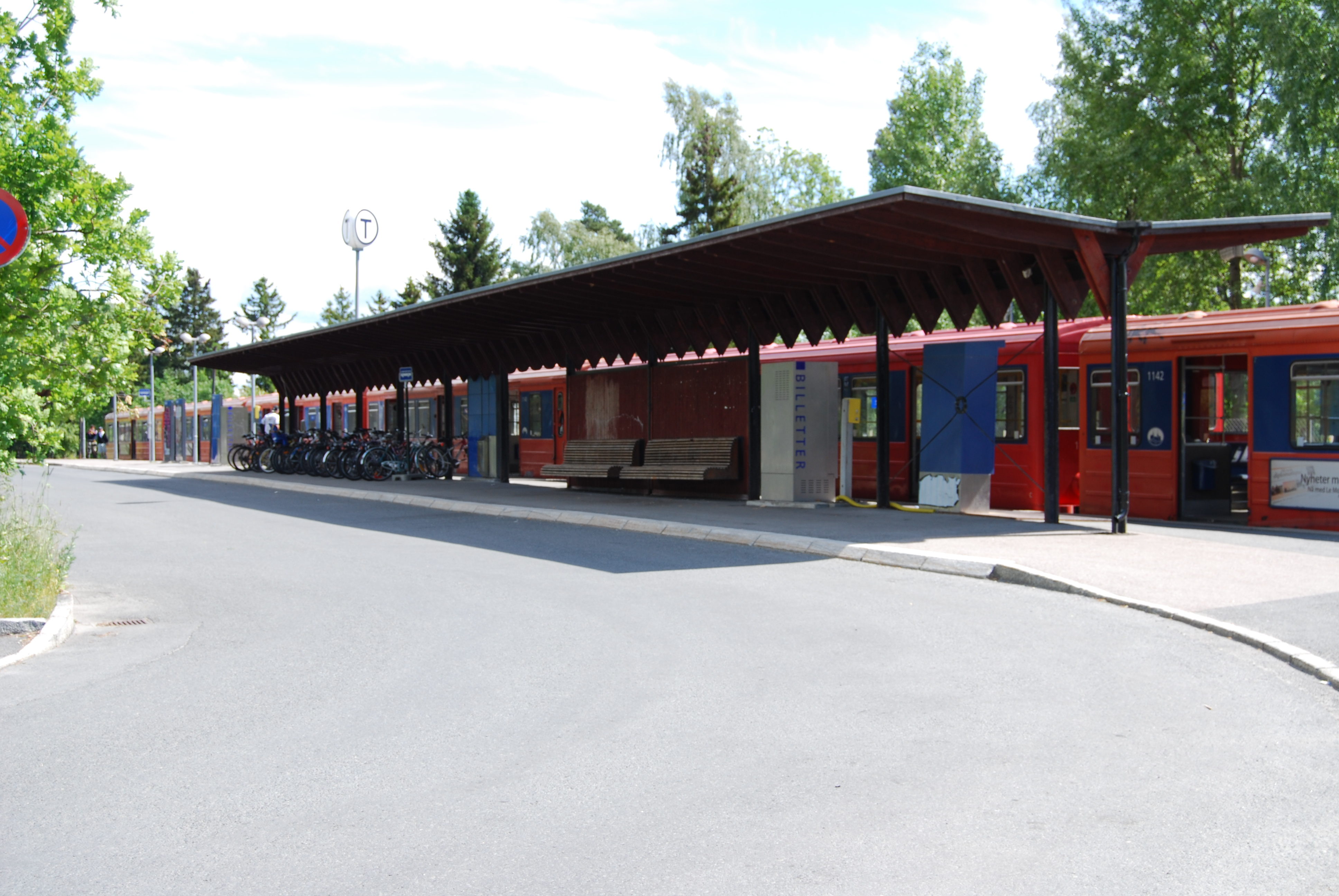 Østerås stasjon (Oslo) 2009 r.